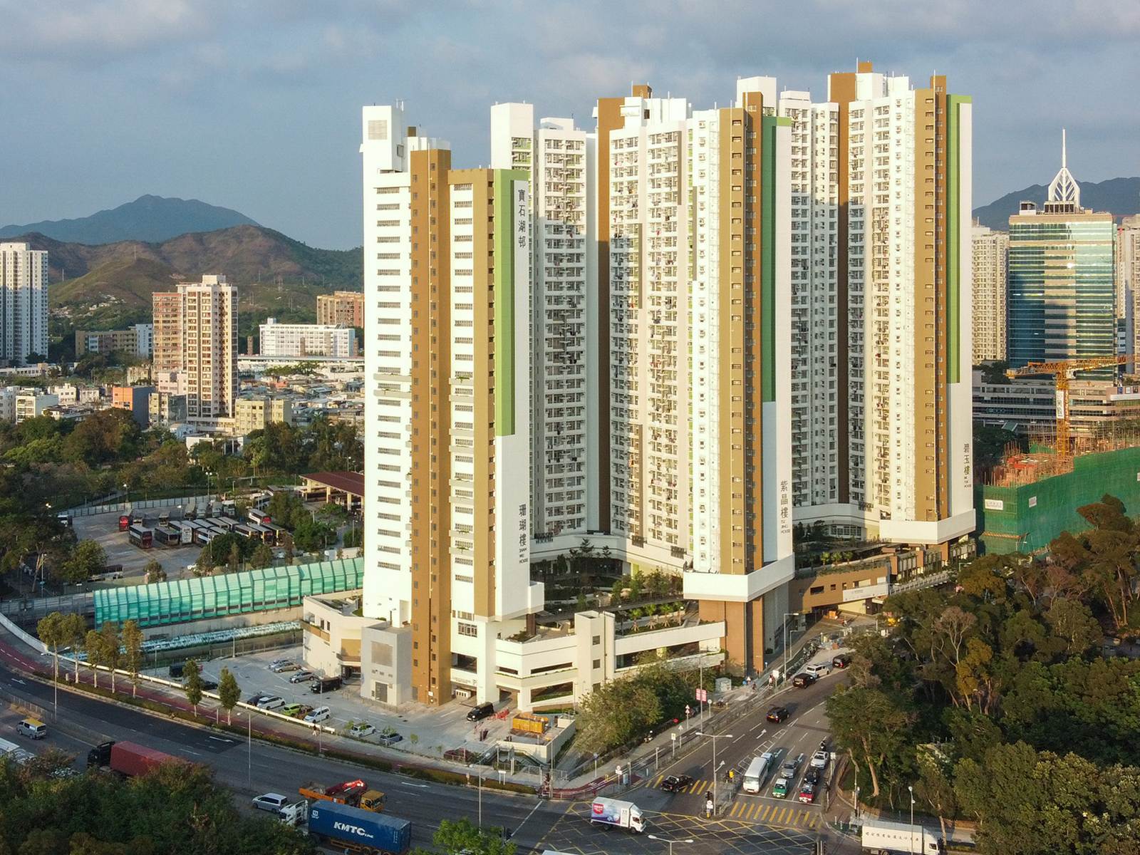 Po Shek Wu Estate